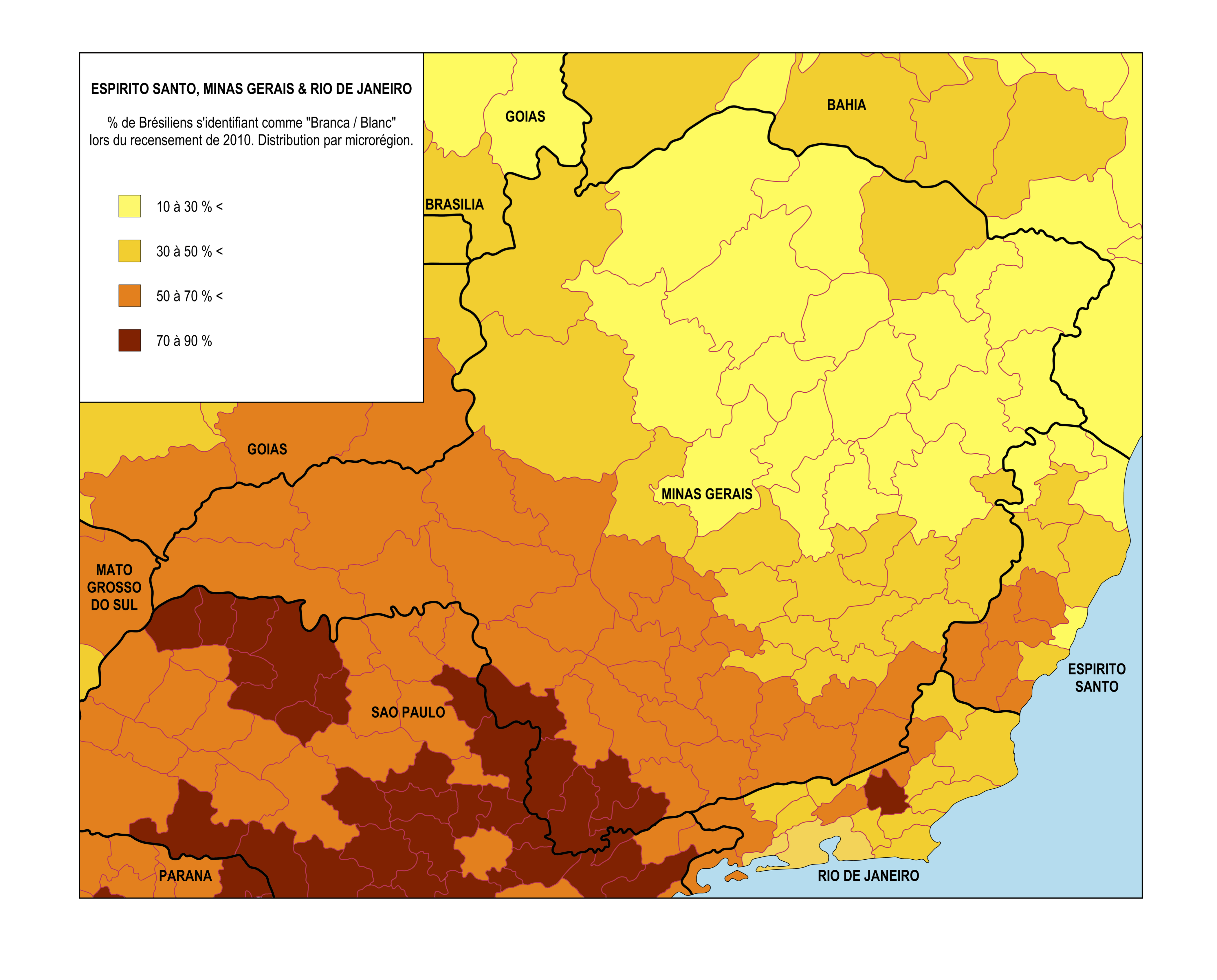 MINAS GERAIS : % d'habitants se définissant comme "Blancs / Branca" lors du recensement de 2010 par État de la Fédération.